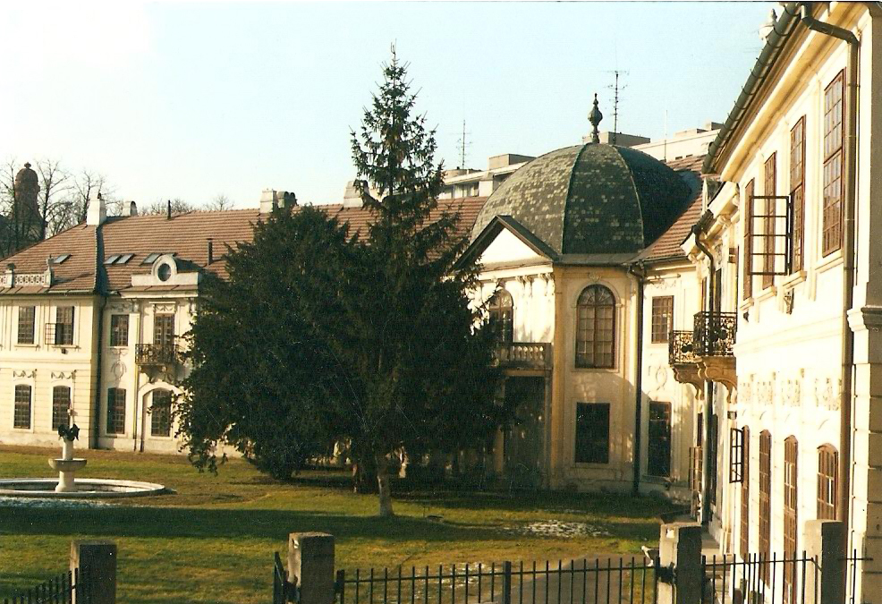 Budova Dekanátu Lekárskej fakulty UK v Bratislave